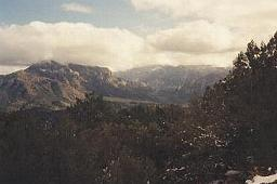 Chiricahua Mountains